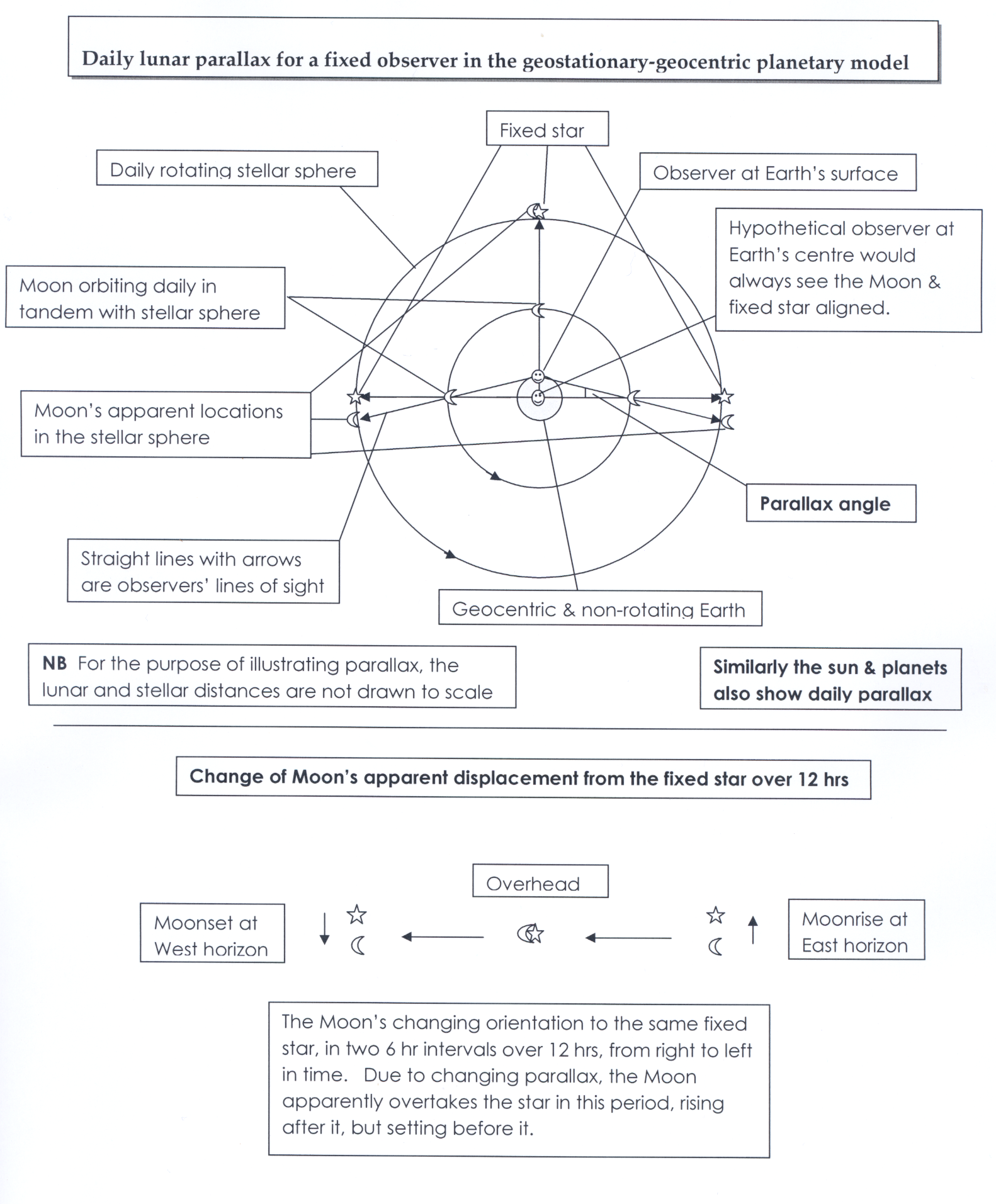 Diagram of lunar parallax